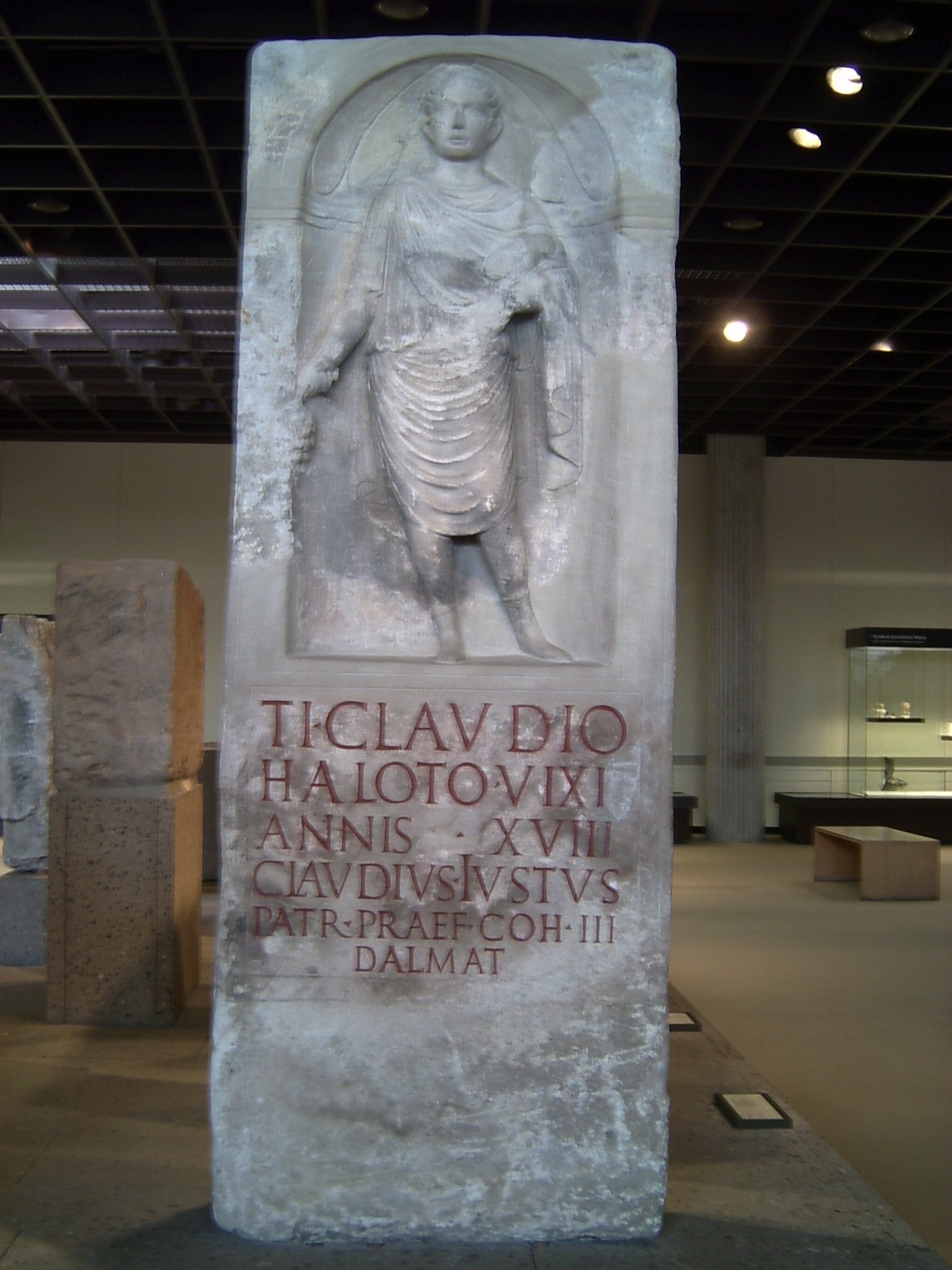 CIL XIII 8271. For other images, see gallery Römisch-Germanisches Museum.